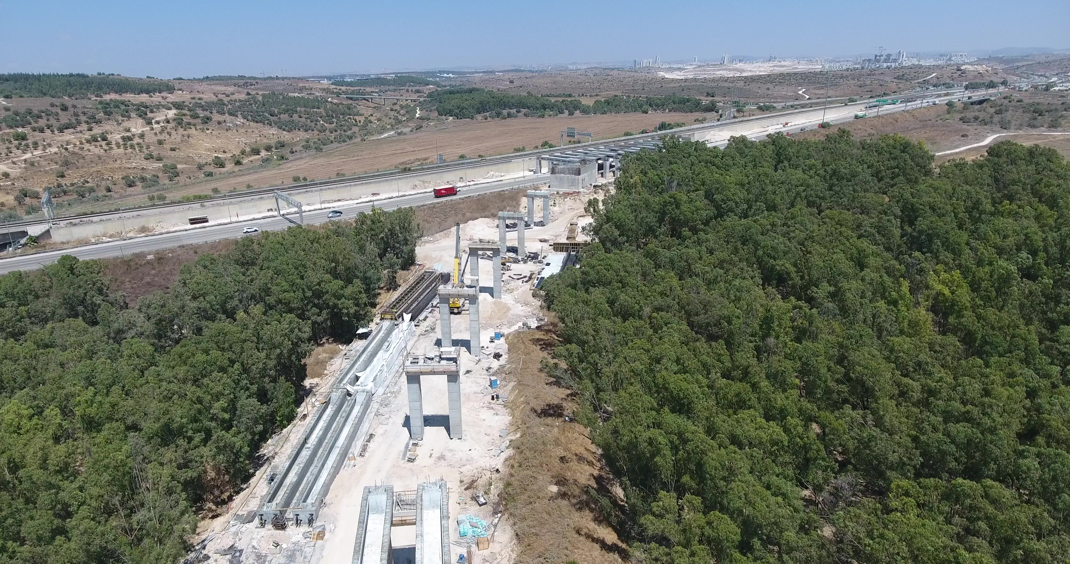 קשת מסילתית המחברת את המסילה המגיעה מקו הרכבת לירושלים אל שלוחת הרכבת למודיעין בסמוך למחלף ענבה. ברקע נראה כביש 431 שמסילת הרכבת למודיעין עוברת בין נתיביו. והעיר מודיעין